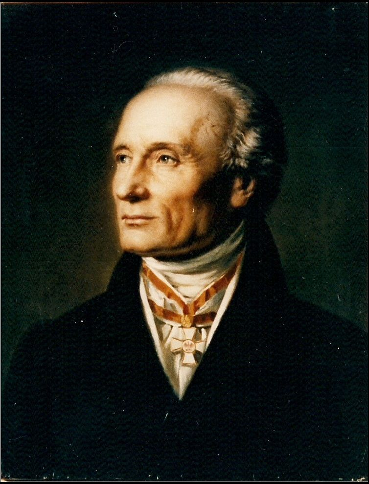 Portrait